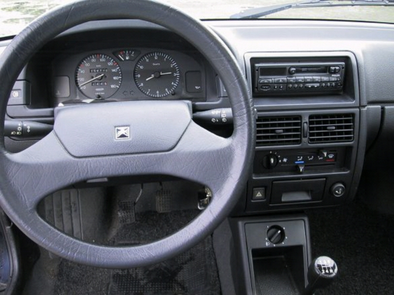 Armaturenbrett eines Citroen AX